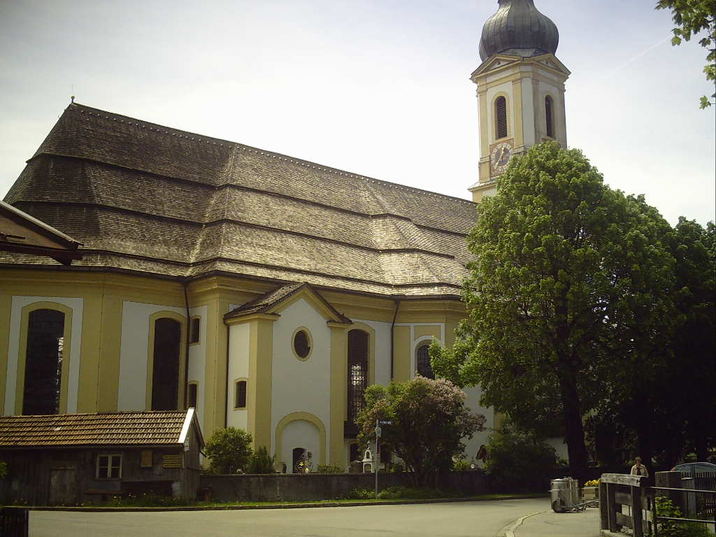 Kirche Lenggries